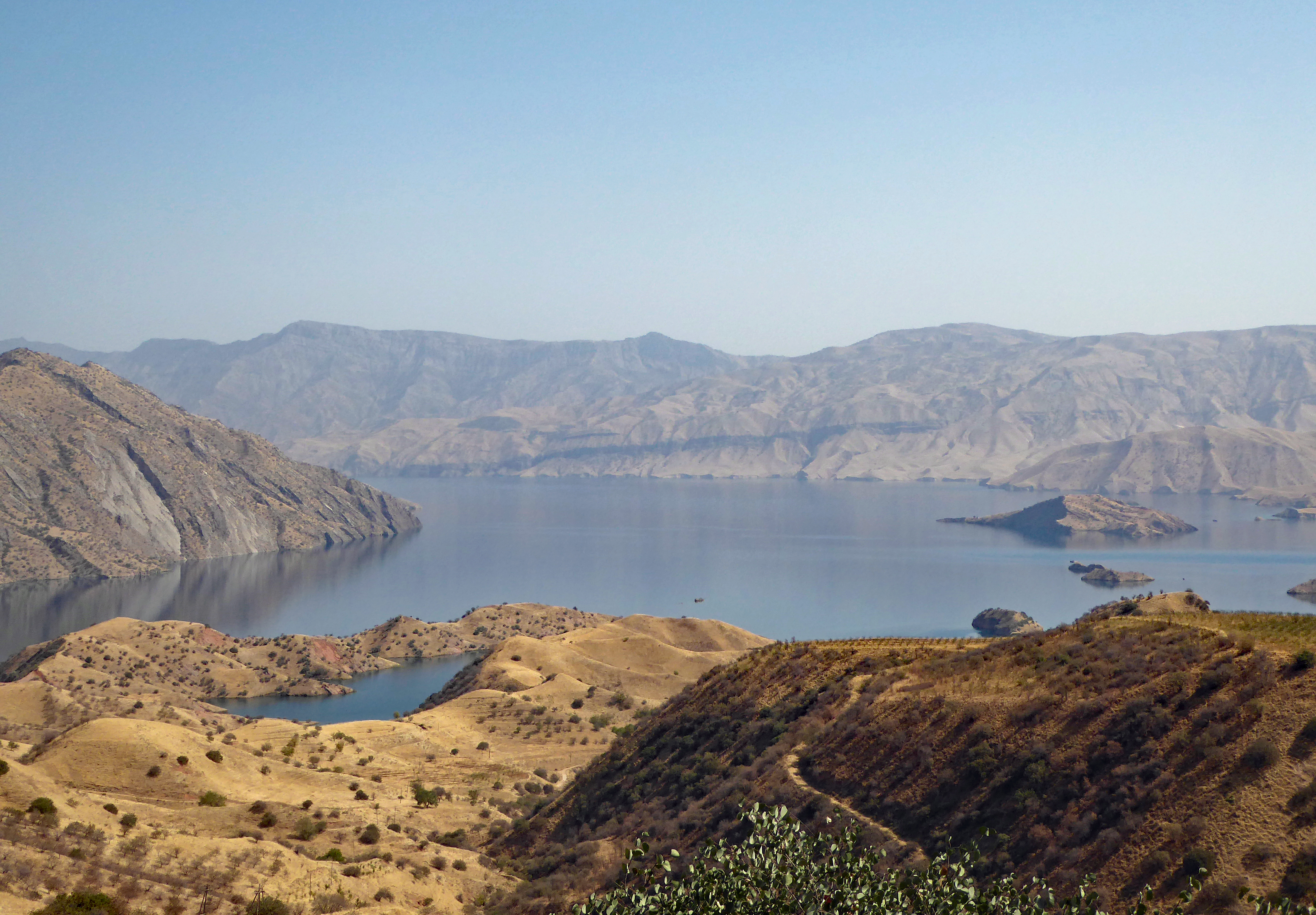 Nurek Reservoir (1)